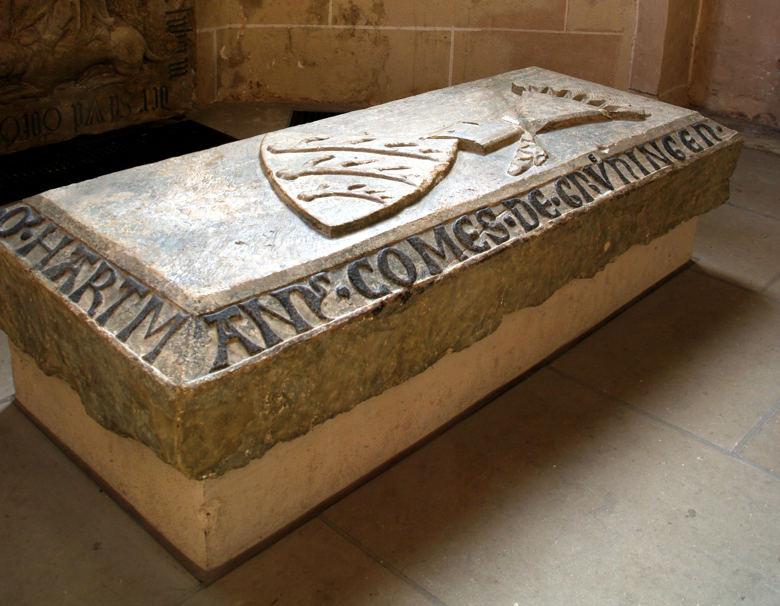 Die sarkophargartige Grabplatte des 1280 gestorbenen Graf Hartmann von Grüningen, dem Stifter der Bartholomäuskirche Markgröningen. Dieser Grabstein gilt als ältester mit dem Wappen von Württemberg. Die Platte liegt in der Vollandkapelle in der Markgröninger Bartholomäuskirche.